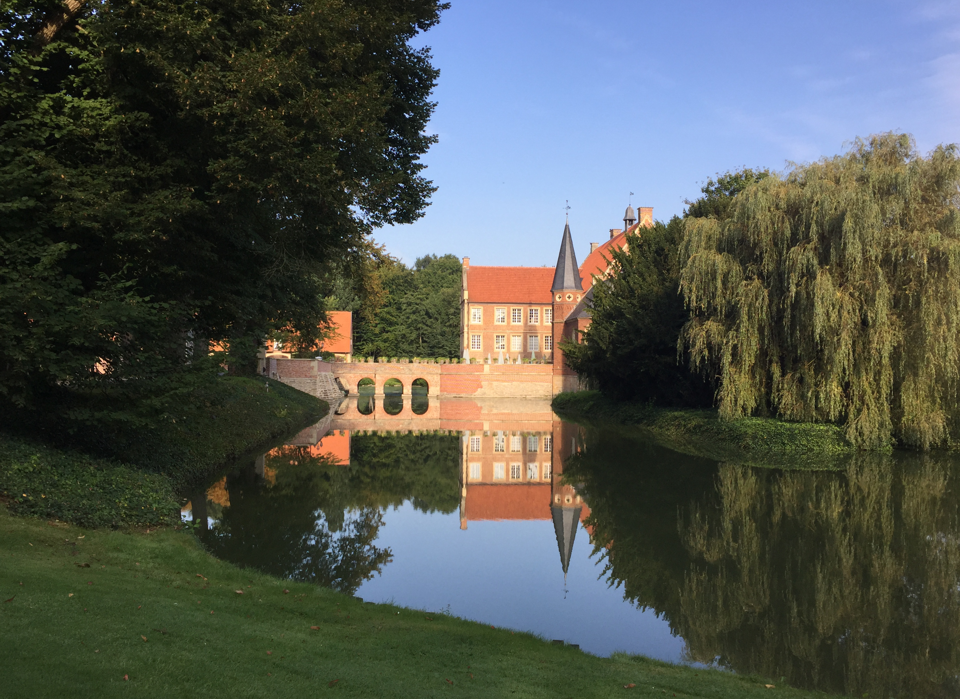 Burg Hüsoff